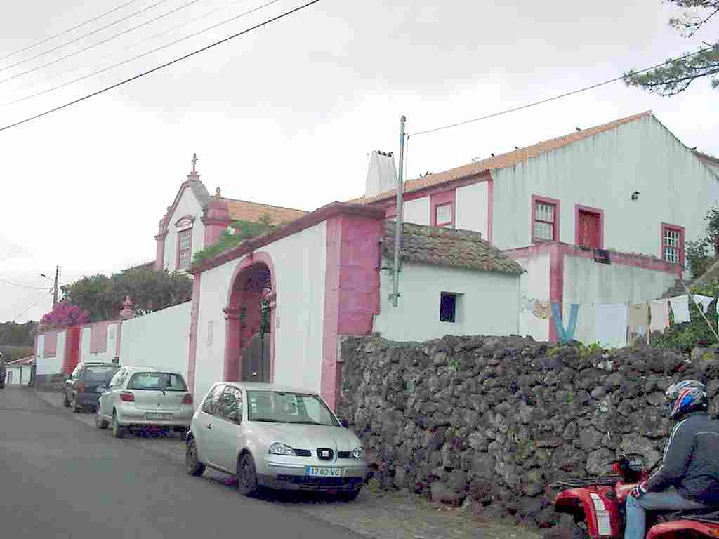 Quinta do Rosário, vista geral, ilha Terceira, Açores